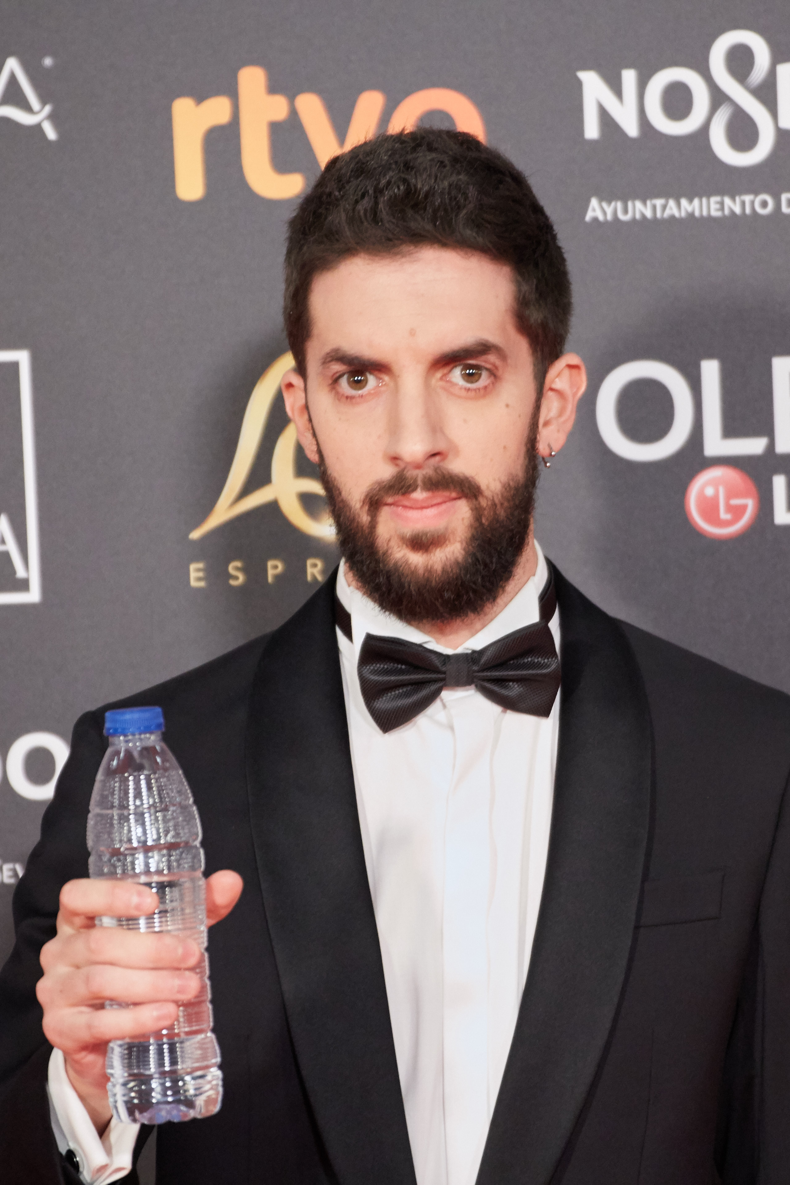 David Broncano en la alfombra roja de los Premios Goya celebrados en Sevilla en Febrero 2019